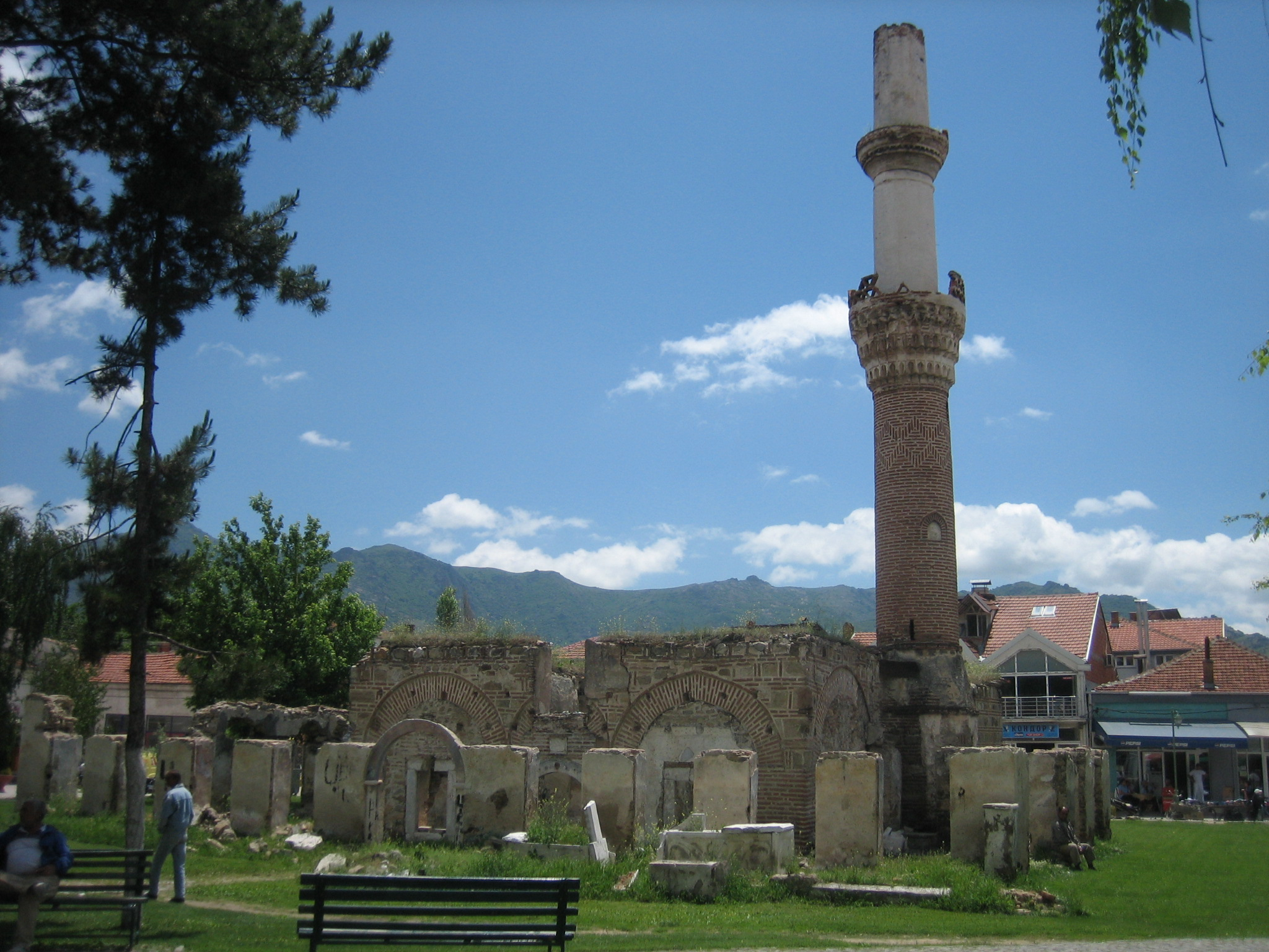 Prilep, Macedonia